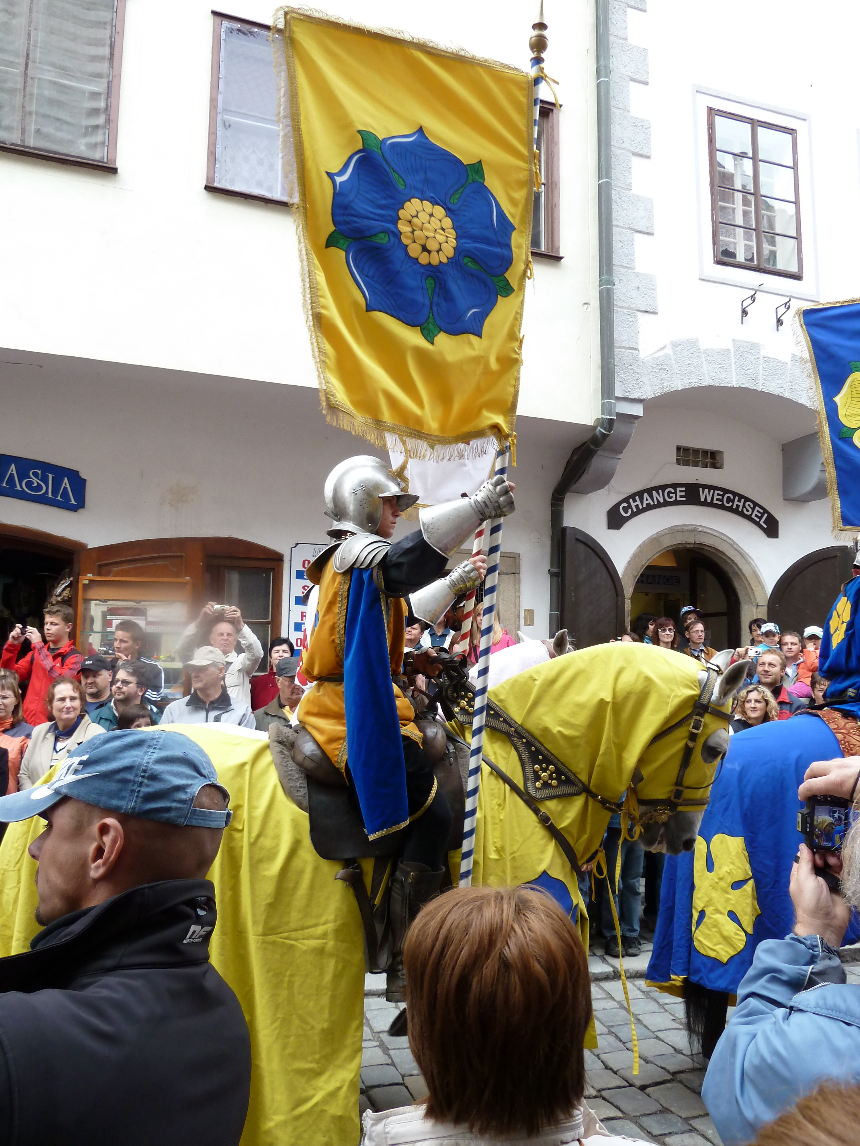 Průvod Krumlov jezdec, modrá růže ve zlatém poli.